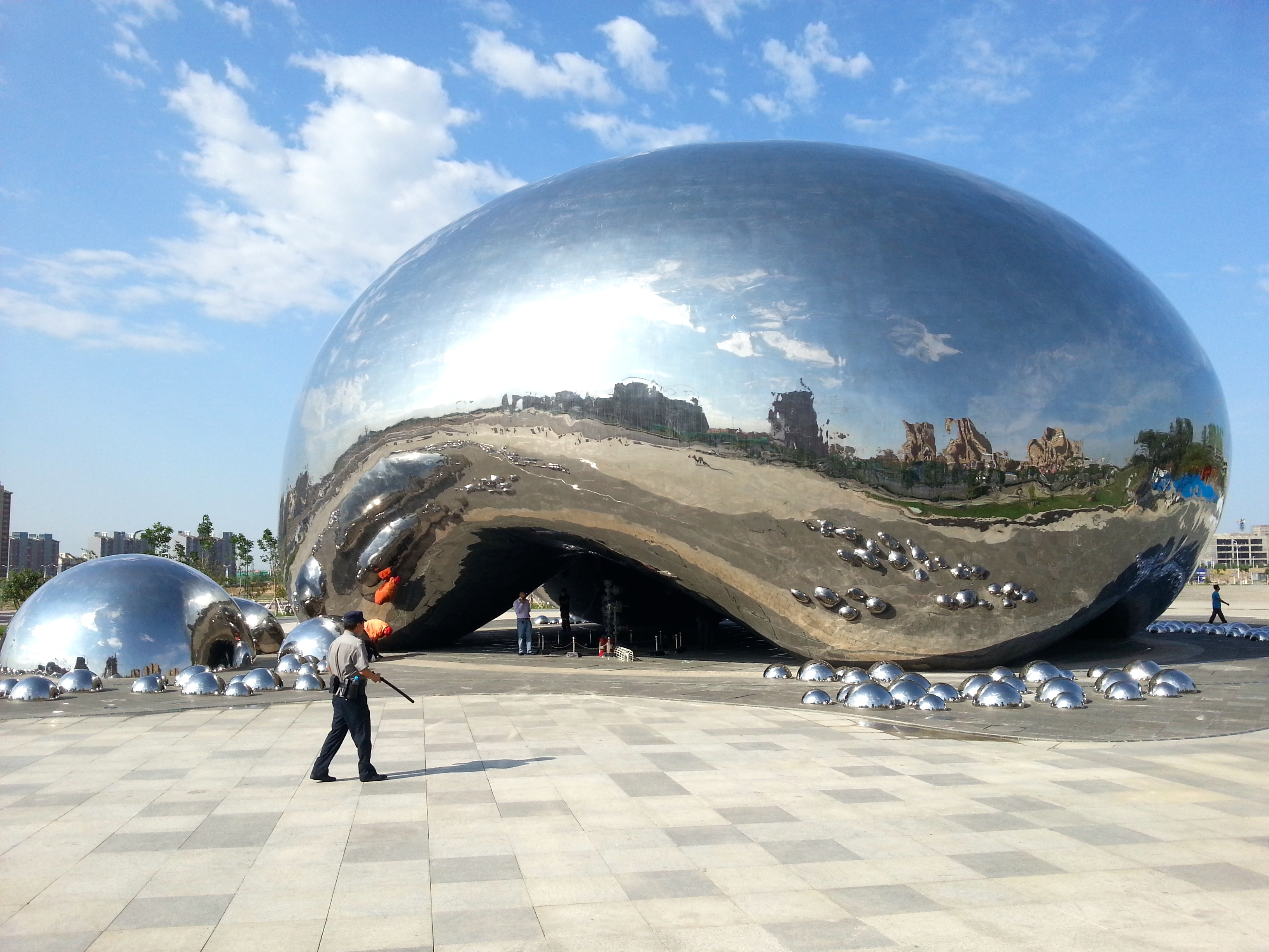 Kunstinstallasjonen «Large-Oil-Bubble» over Karamay «Oilwell No.1»